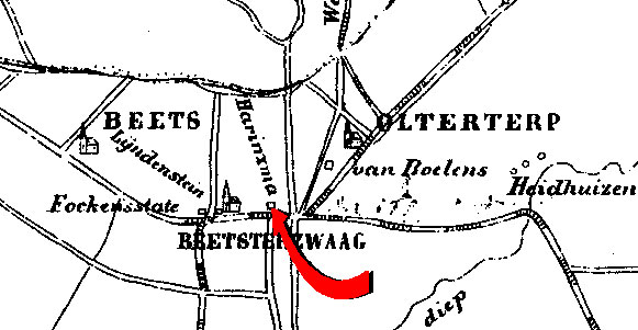 Kaartje met ligging van de Harinxmastate (de locatie van de Harinxmastate door mij met rode pijl gemarkeerd)